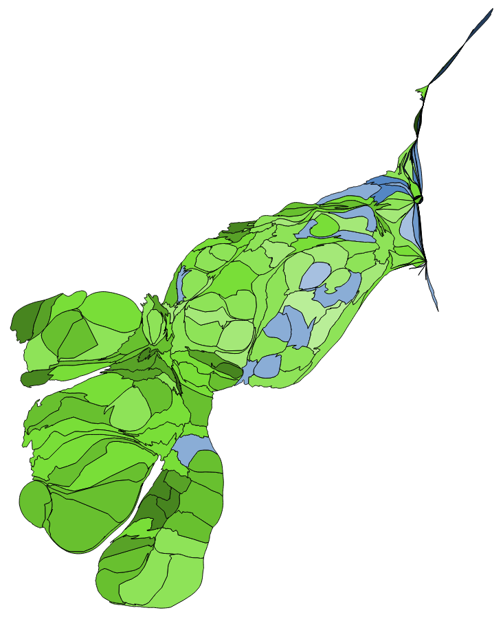 中文（台灣）: 顏色對照表